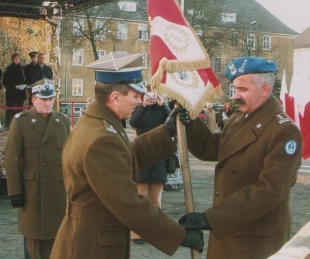 Dowódca garnizonu Stargard Szczec. ppłk Adam Kalczyński (2005)